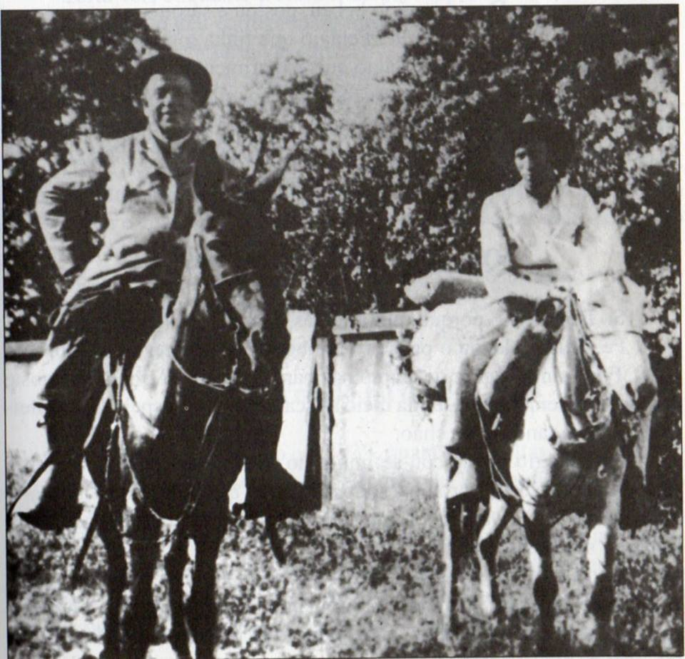 Os padres Pelágio e Hermínio, em Trindade (Goiás)